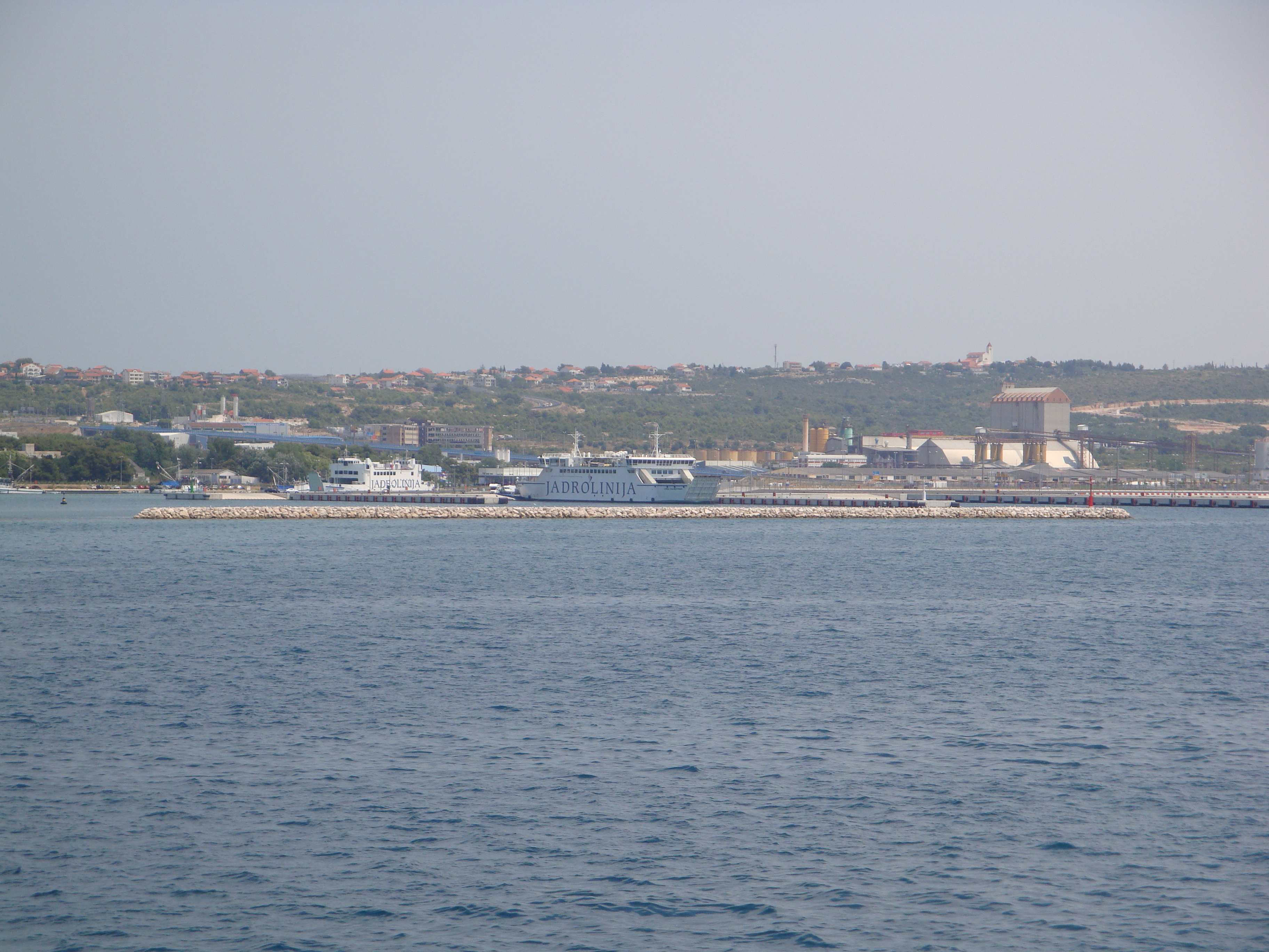 Luka Gaženica, Zadar